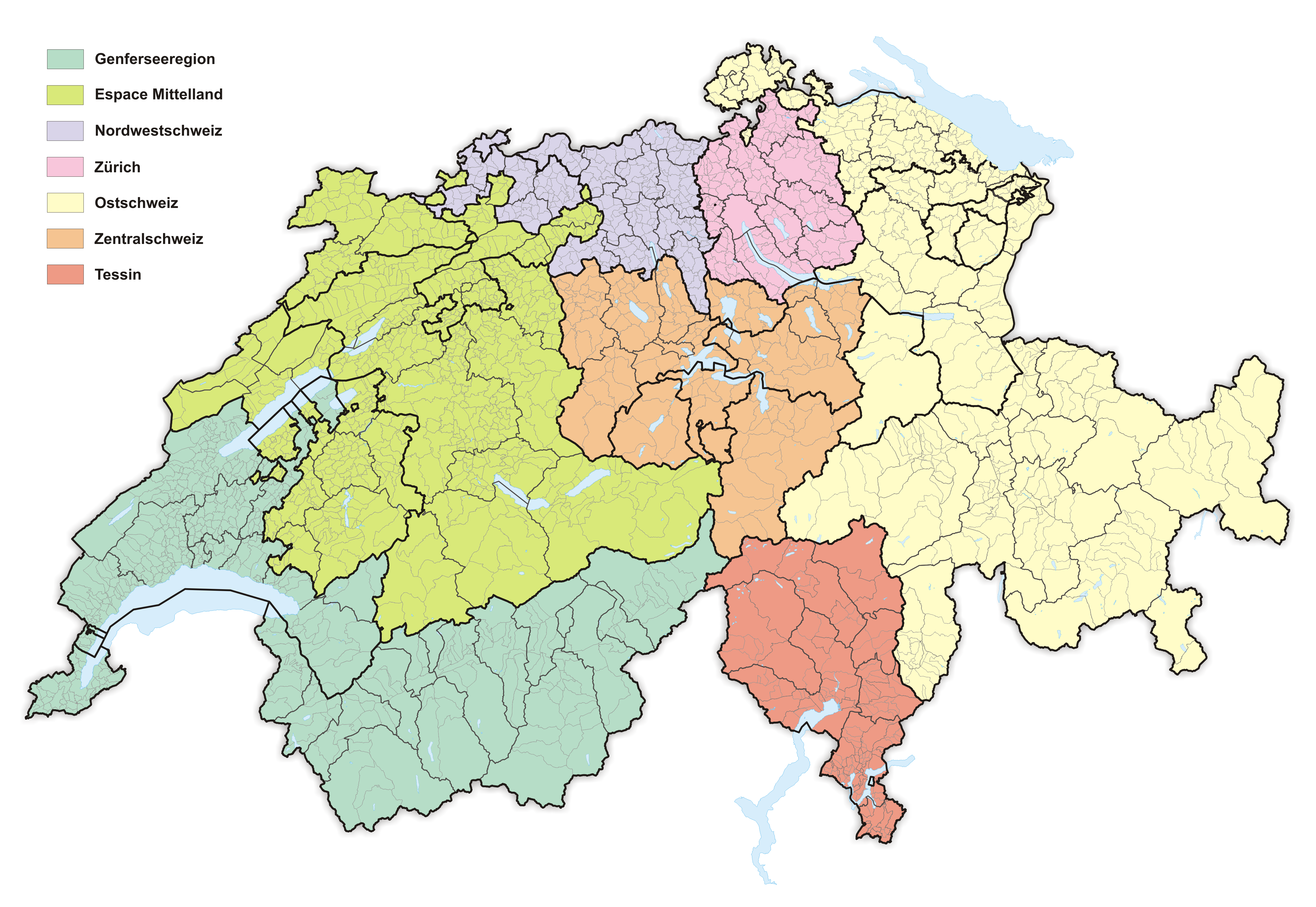 Grossregionen der Schweiz 2013